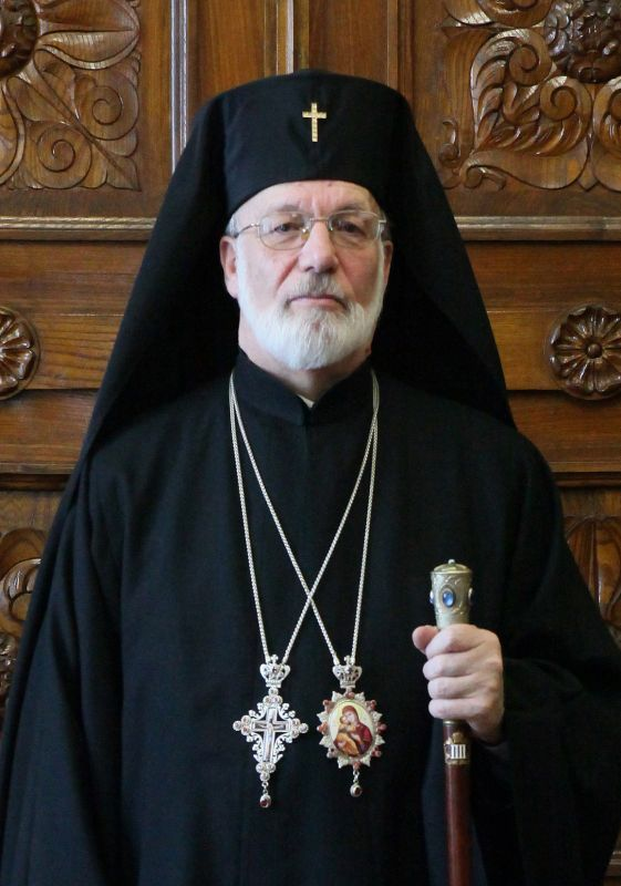 Негово Високопреосвещенство Доростолски митрополит Амвросий